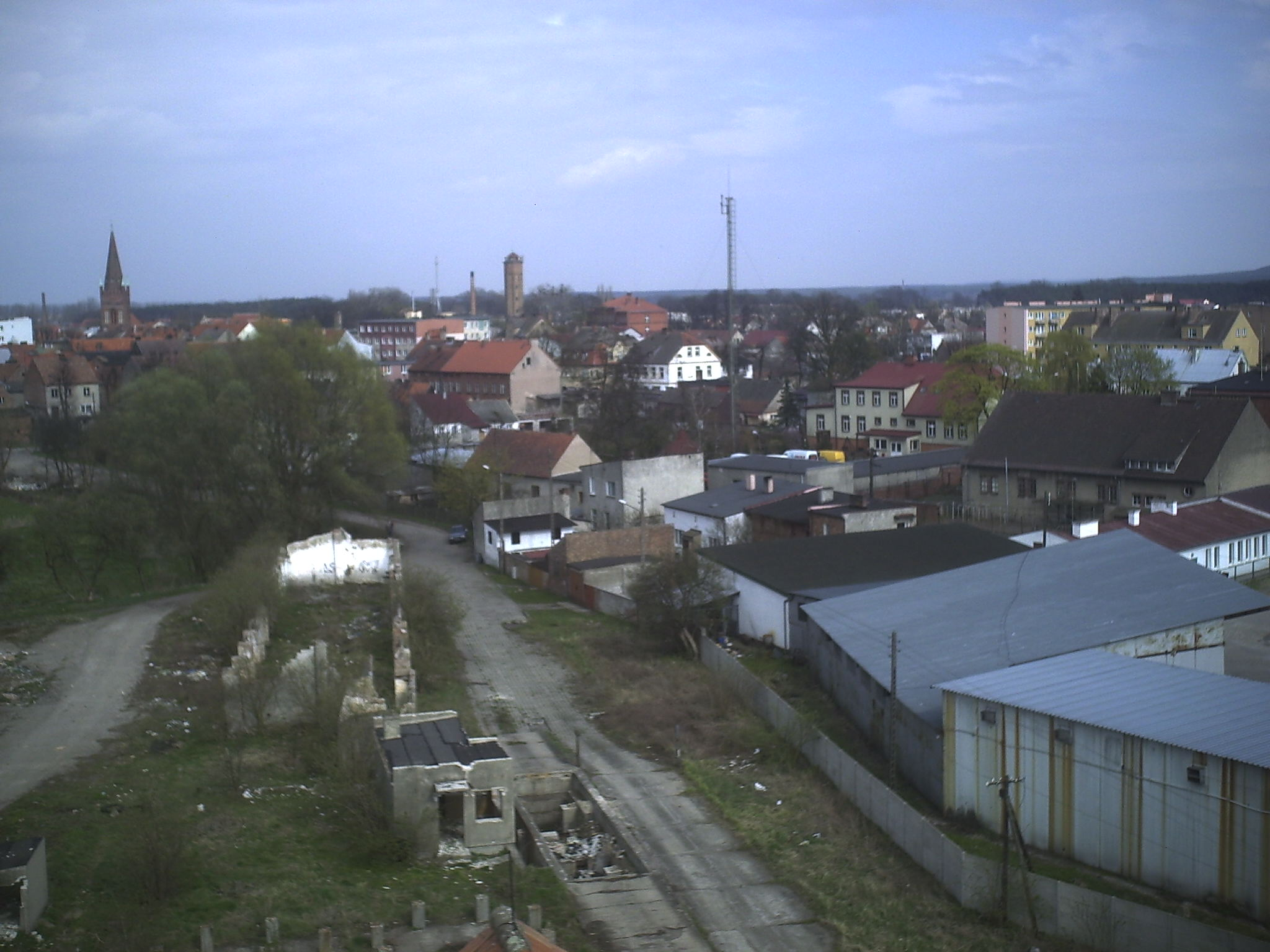 A view of Skwierzyna.